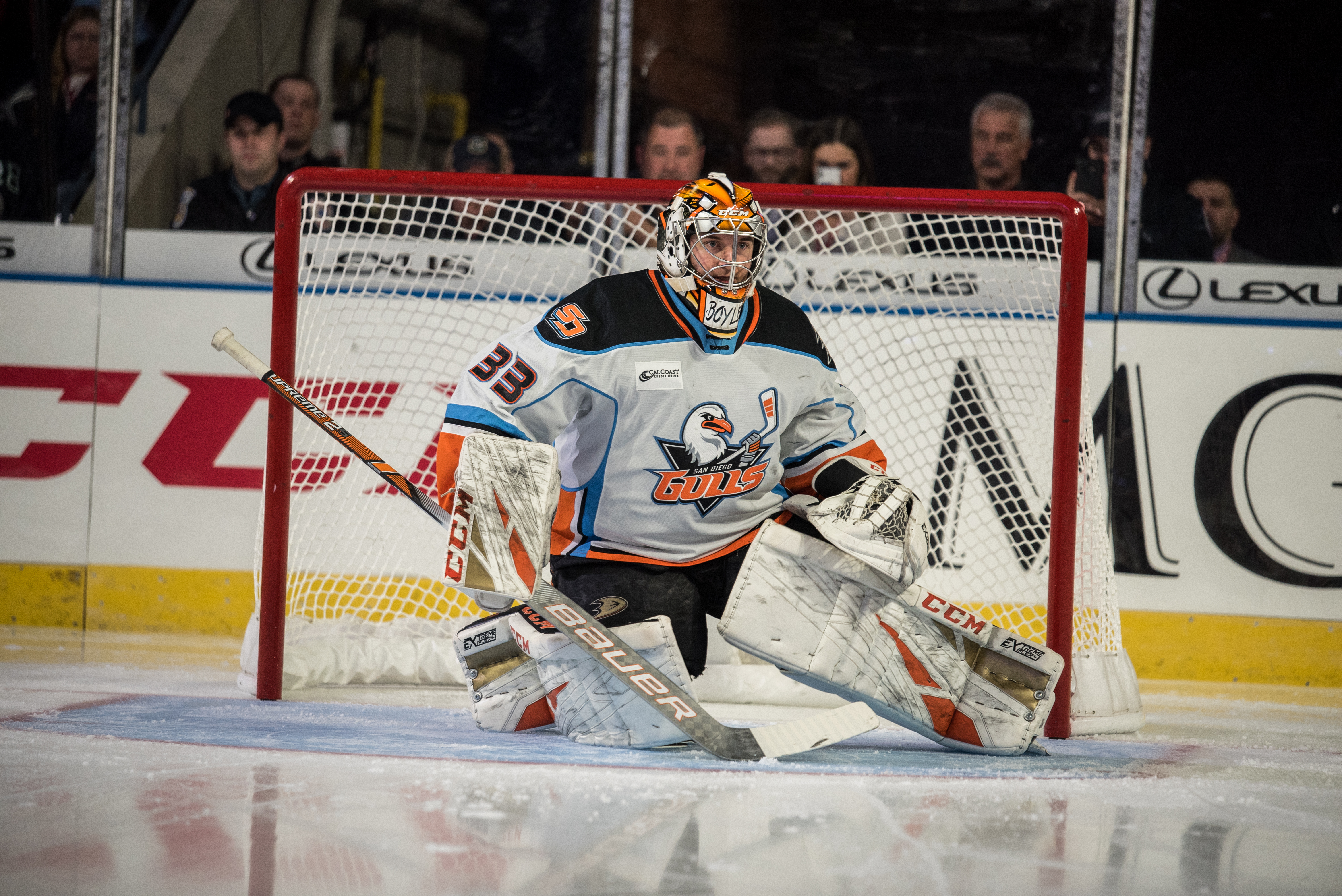 CYW_1472